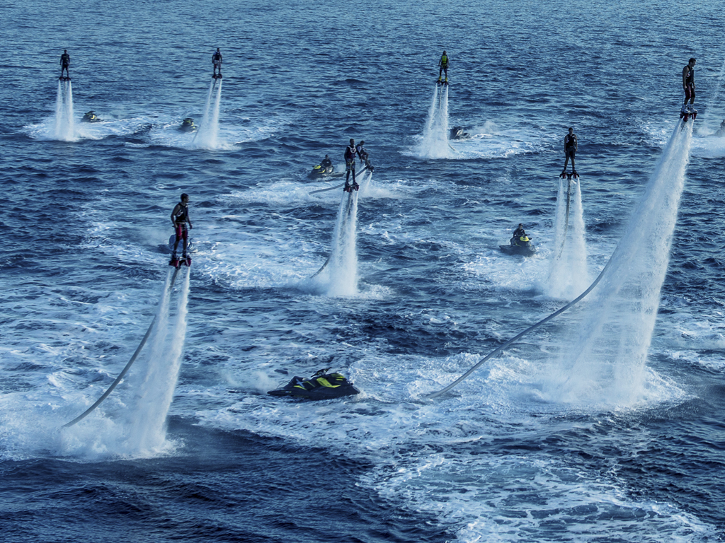 Varias personas practican FlyBoard a la vez. Algunos con una persona encima de la moto de agua llevadores el control del gas y otros sin nadie en la moto y controlando ellos mismos la potencia de la moto de agua mediante un sistema de control EMK.